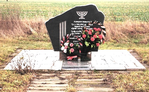 Памятник убитым во время Холокоста евреям деревни Чернавчицы Брестского района.